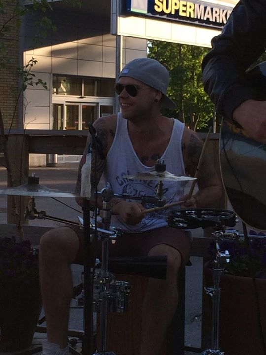 Raine Siltala rummuissa Niilan keikalla